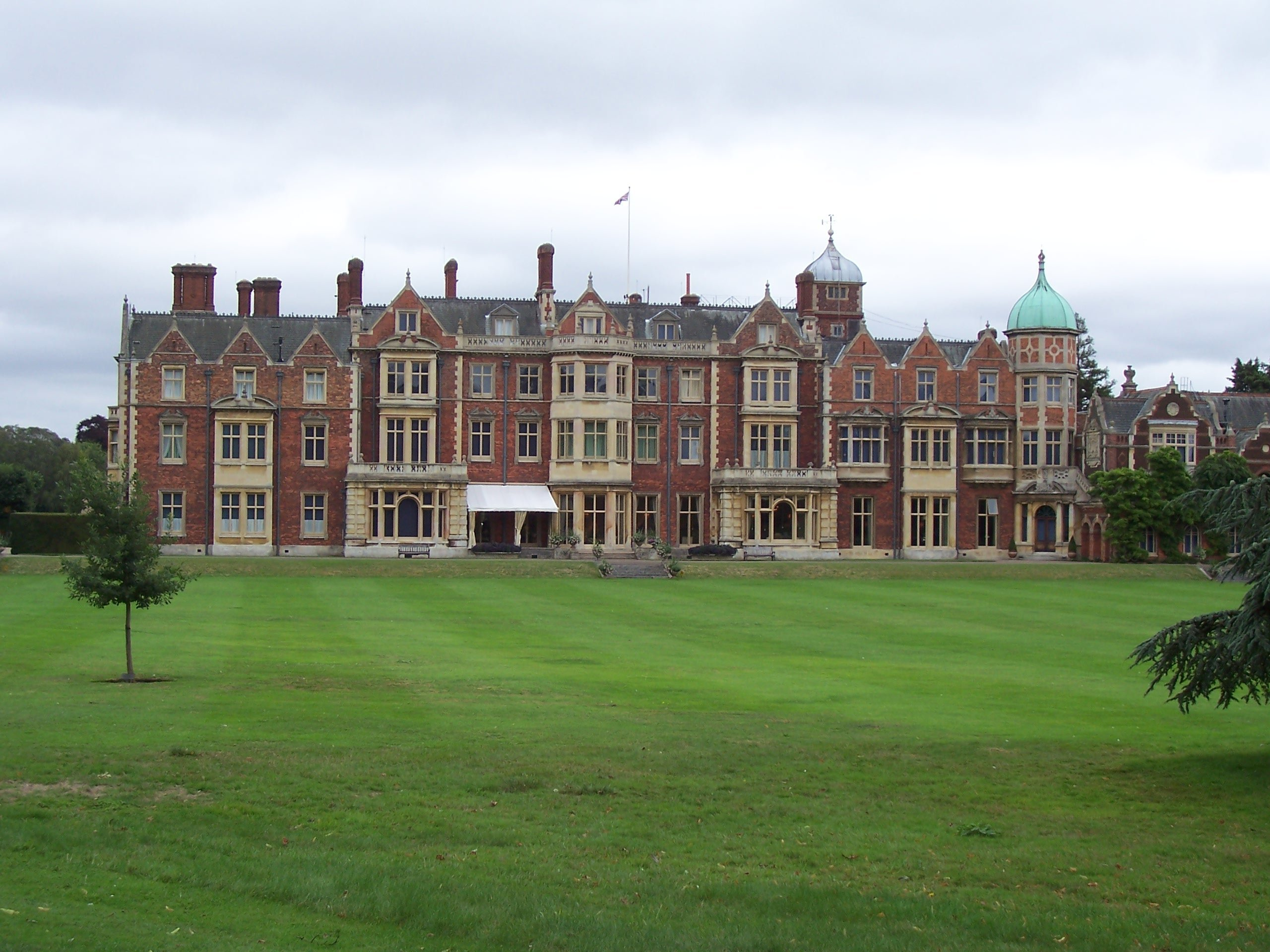 Sandringham